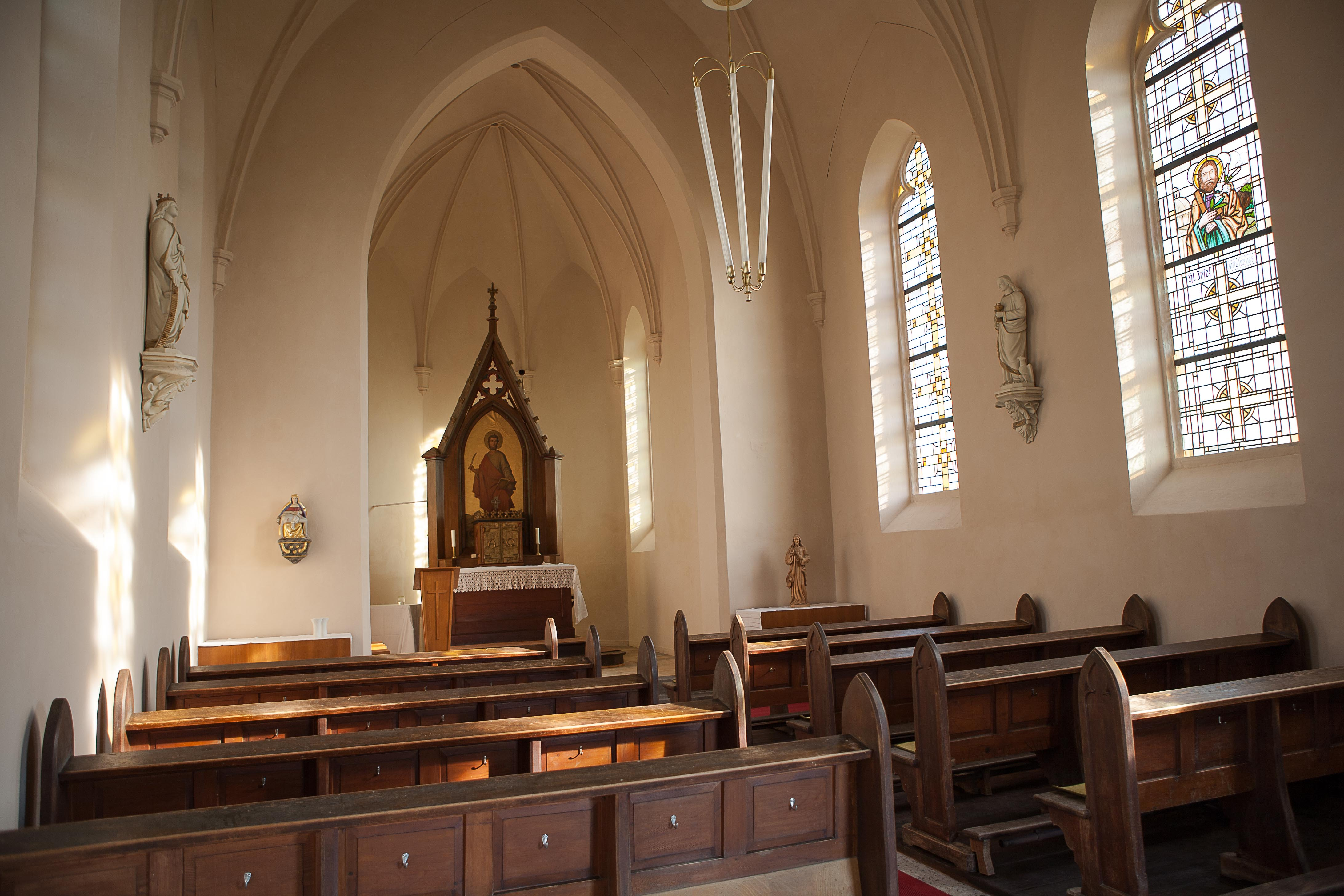 Kircheninneaufnahme2 der Kirche St. Markus (Minkelfeld) nach der Renovierung 2019